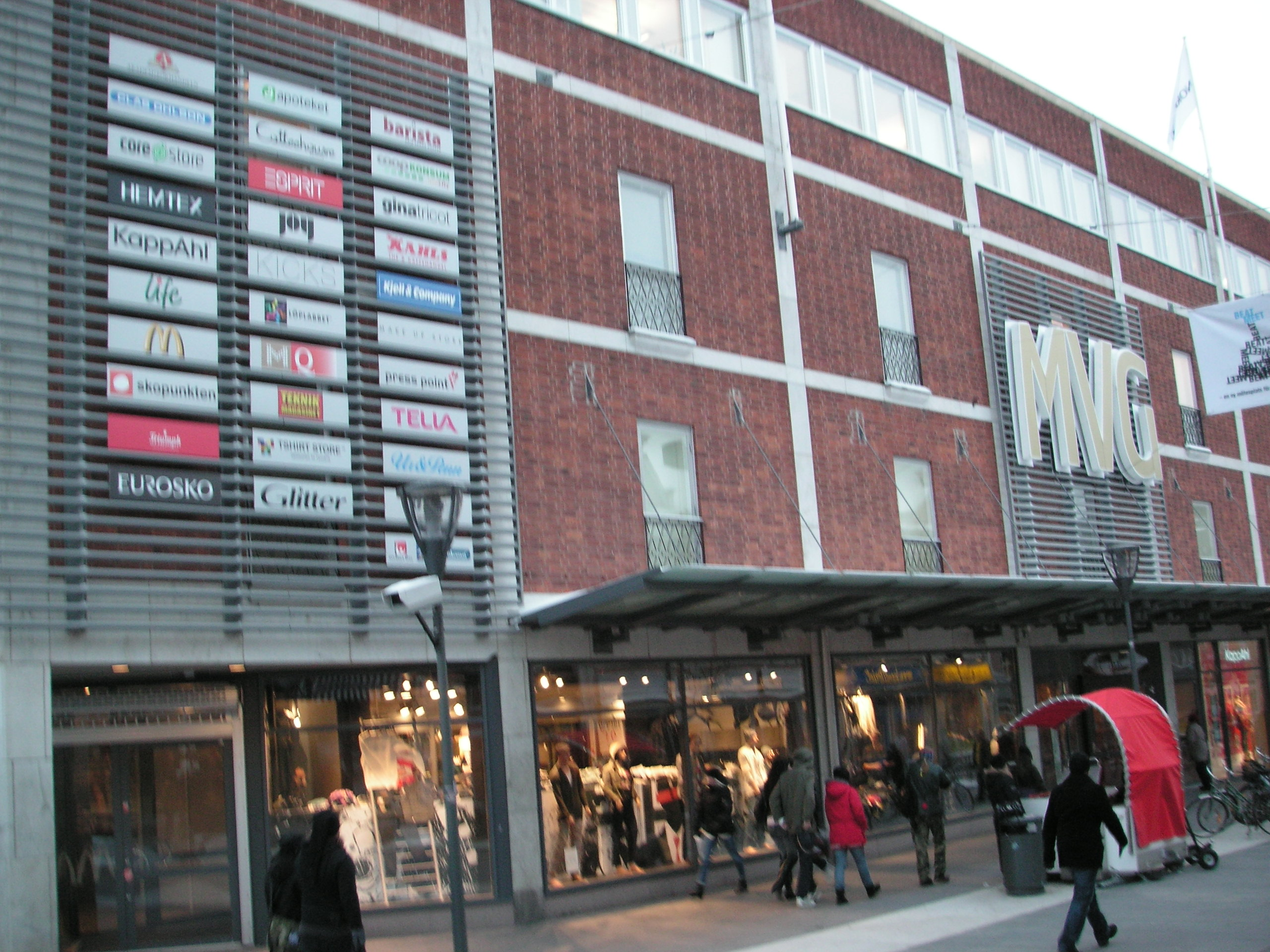 MVG sedd från Kungsgatan.